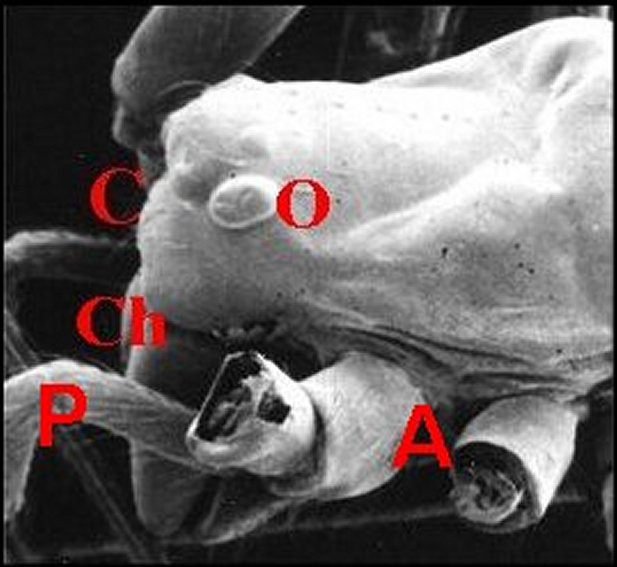 Vue latérale du prosoma d'une Argyrodes femelle. Microscopie à balayage.